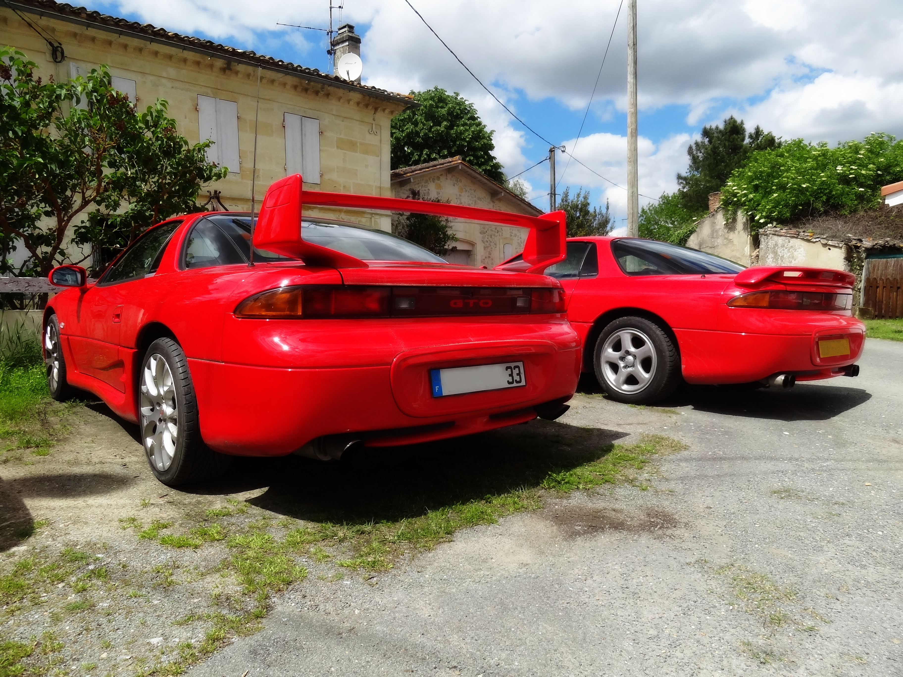 330cv bi-turbo 427 Nm à 2 500 tr/min 4 roues motrices, 4 roues directrices, 2 différentiels à glissement variable (1 central + 1 arrière) 1 760 kg Vitesse maximale 300 km/h Accélération0 à 100 km/h en 5,4 s